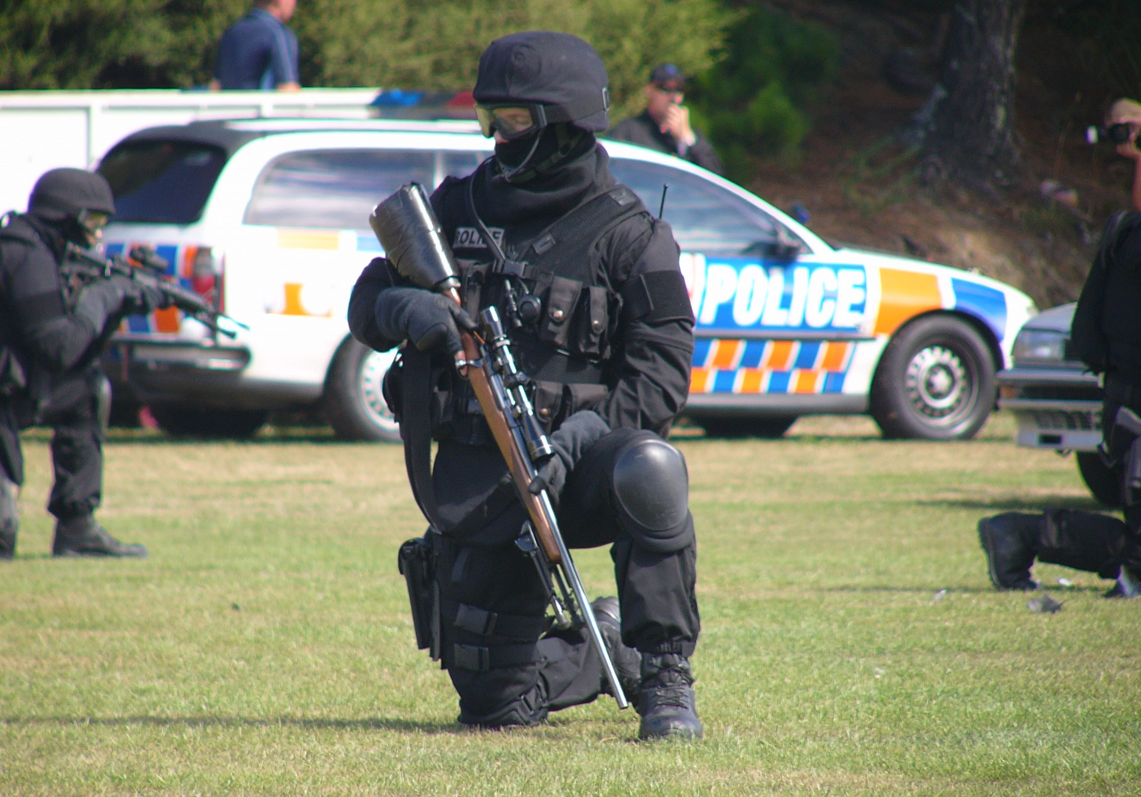 More Photos available at